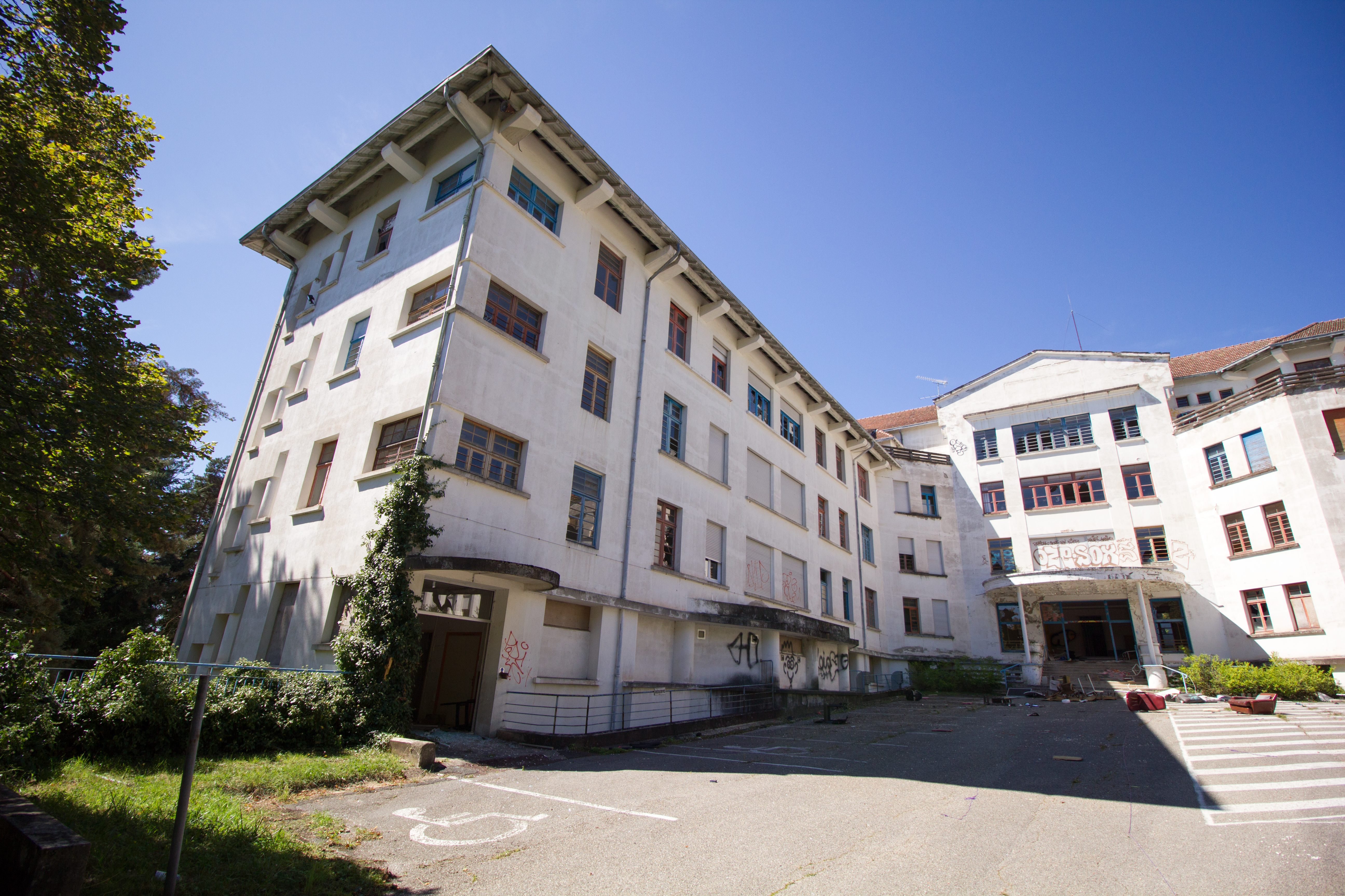 L'entrée du sanatorium